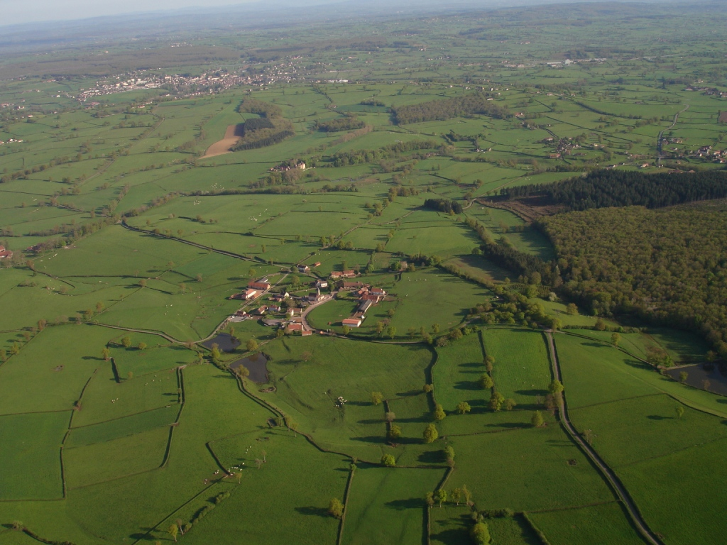 Photographie du bourg vu du ciel